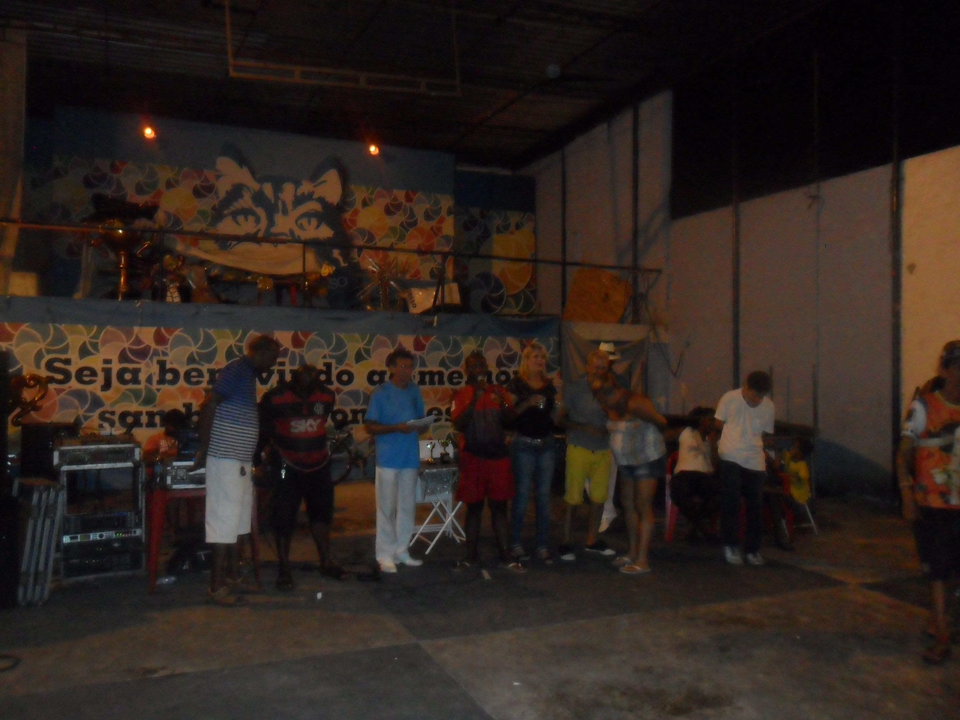 GRES Gato de Bonsucesso